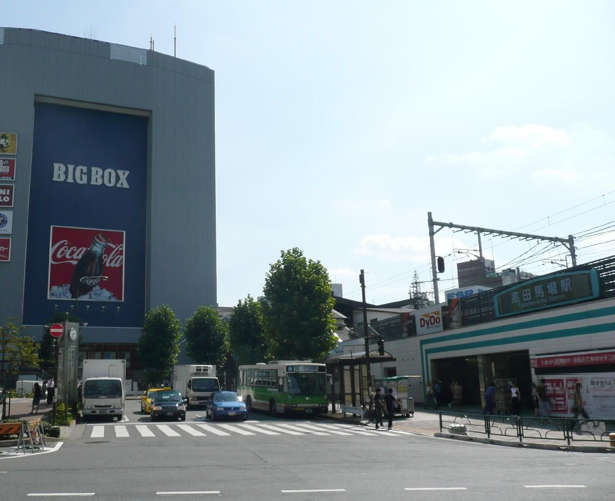 高田馬場駅早稲田口ロータリー